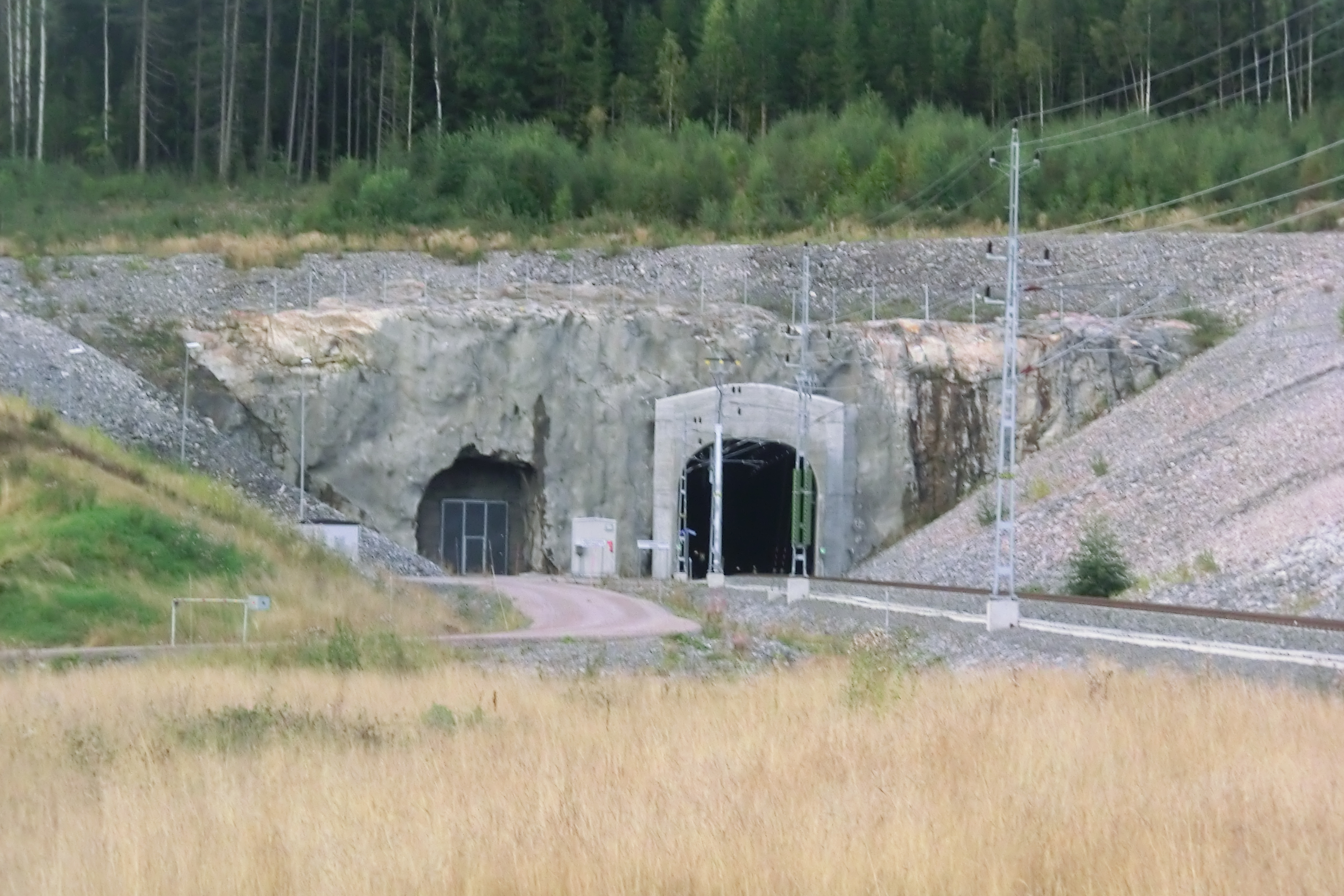 Snarabergstunneln, södra öppningen